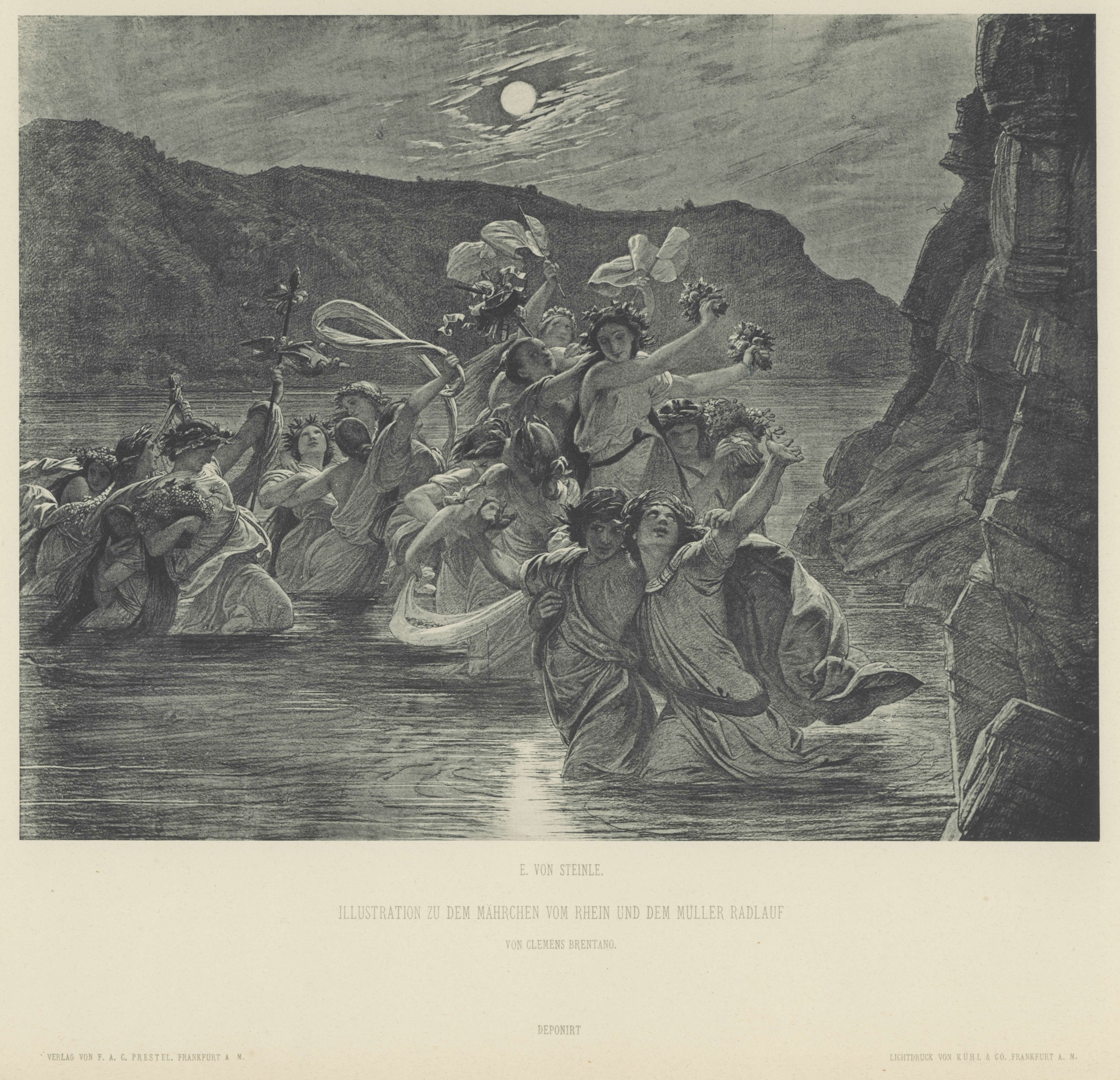 Illustration zu dem Mährchen vom Rhein und dem Müller Radlauf